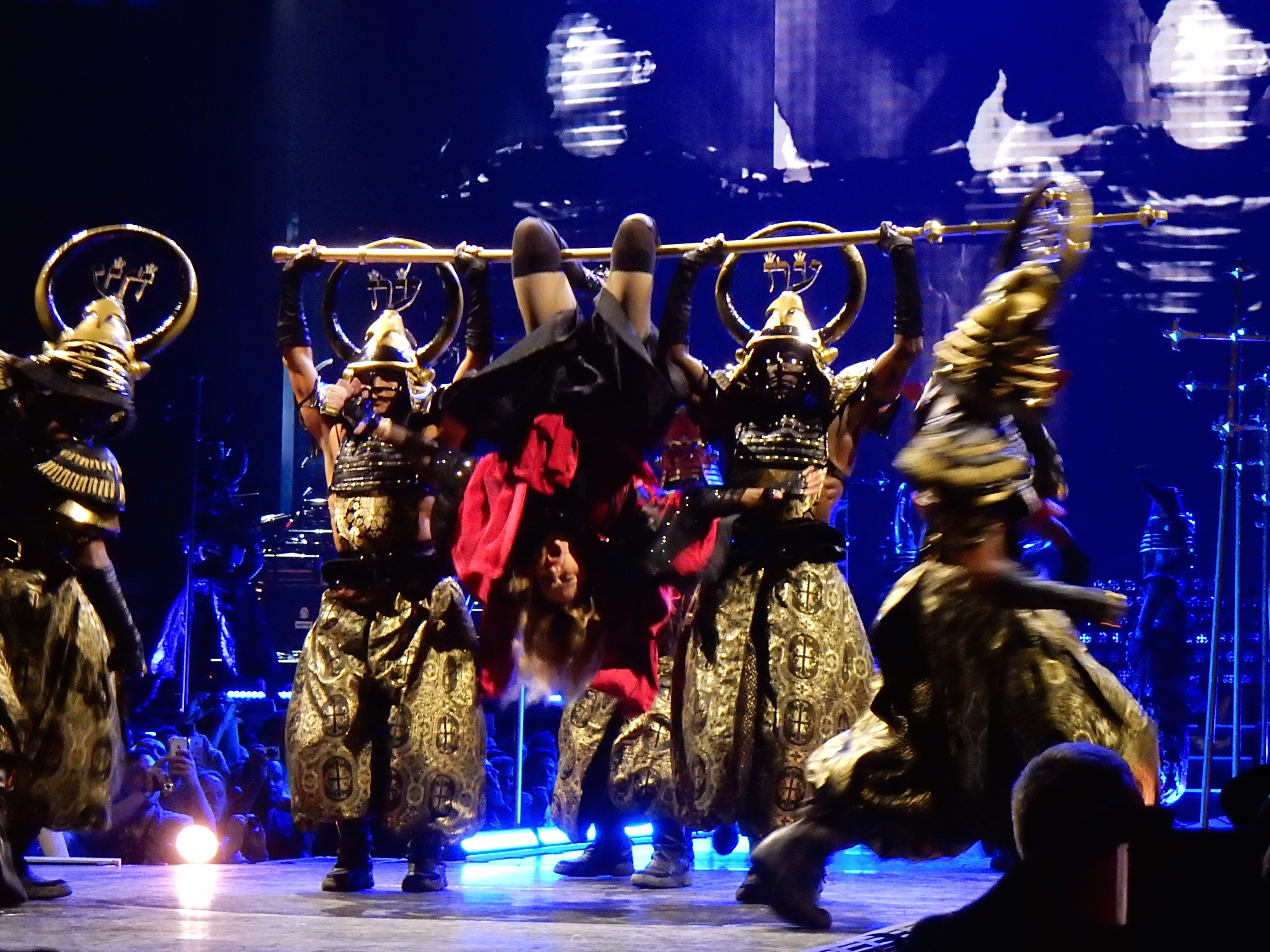 Madonna - Rebel Heart Tour Cologne 2